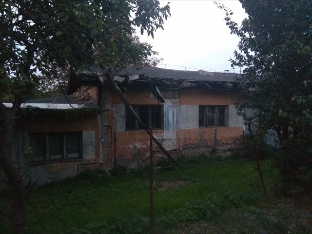 Dům v ulici Jednostranná v Hloubětíně